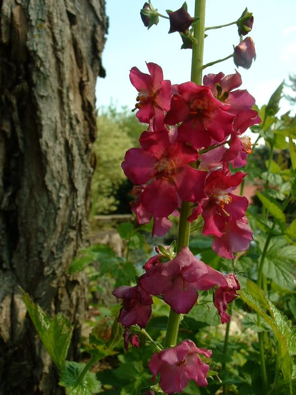 Molène de Phénicie, photo J.F.Gaffard, Gy mai 2004, Licence GFDL